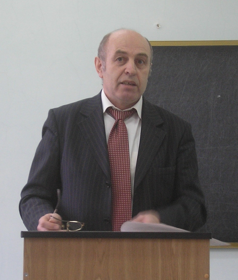 доктор історичних наук, професор Сергійчук Володимир Іванович, професор кафедри давньої та нової історії України Київського національного університету ім. Тараса Шевченка Виступ на захисті дисертації у Донецькому національному університеті, 2007